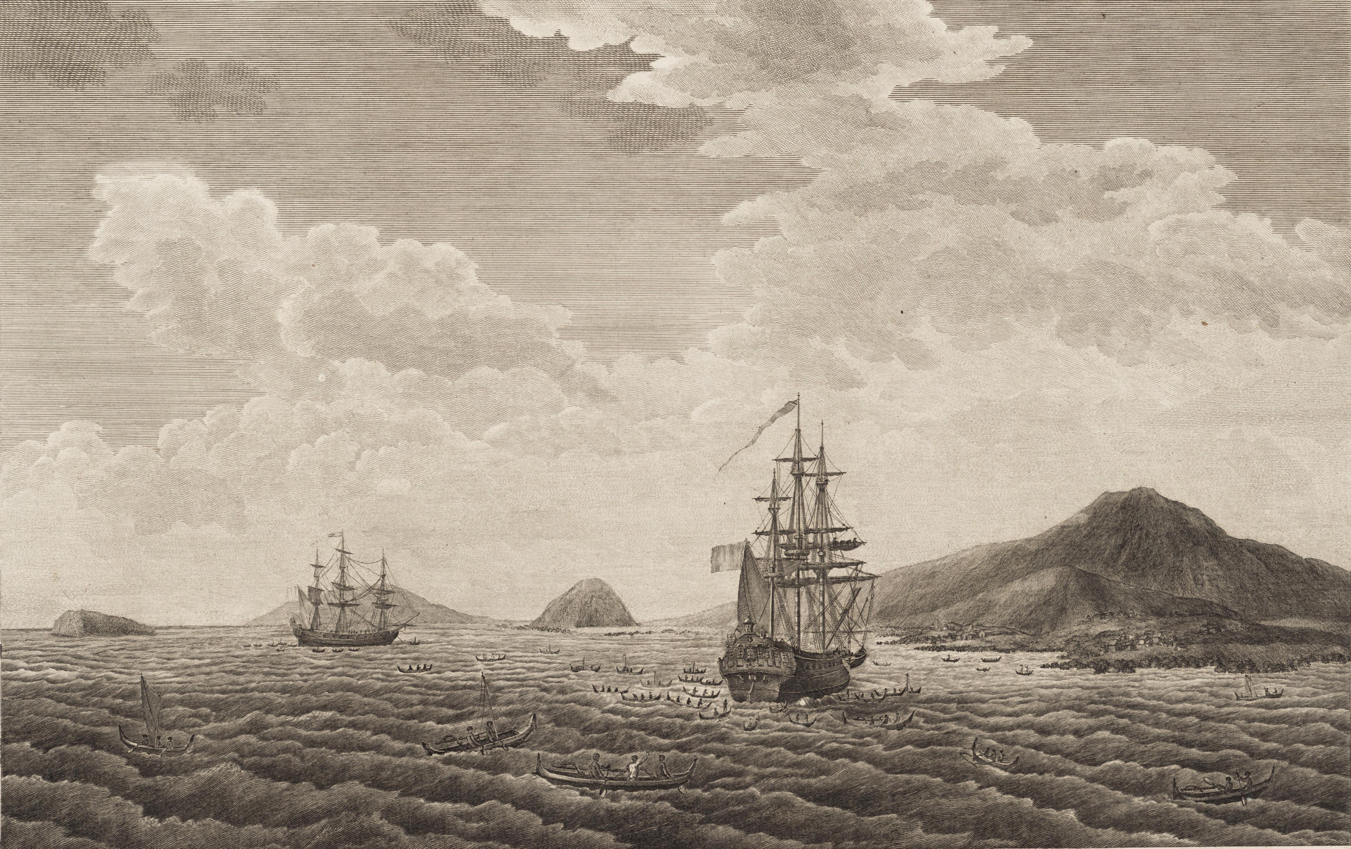 Les frégates l'Astrolabe et la Boussole de l'expédition La Pérouse à Hawai (île de Maui) en 1786.